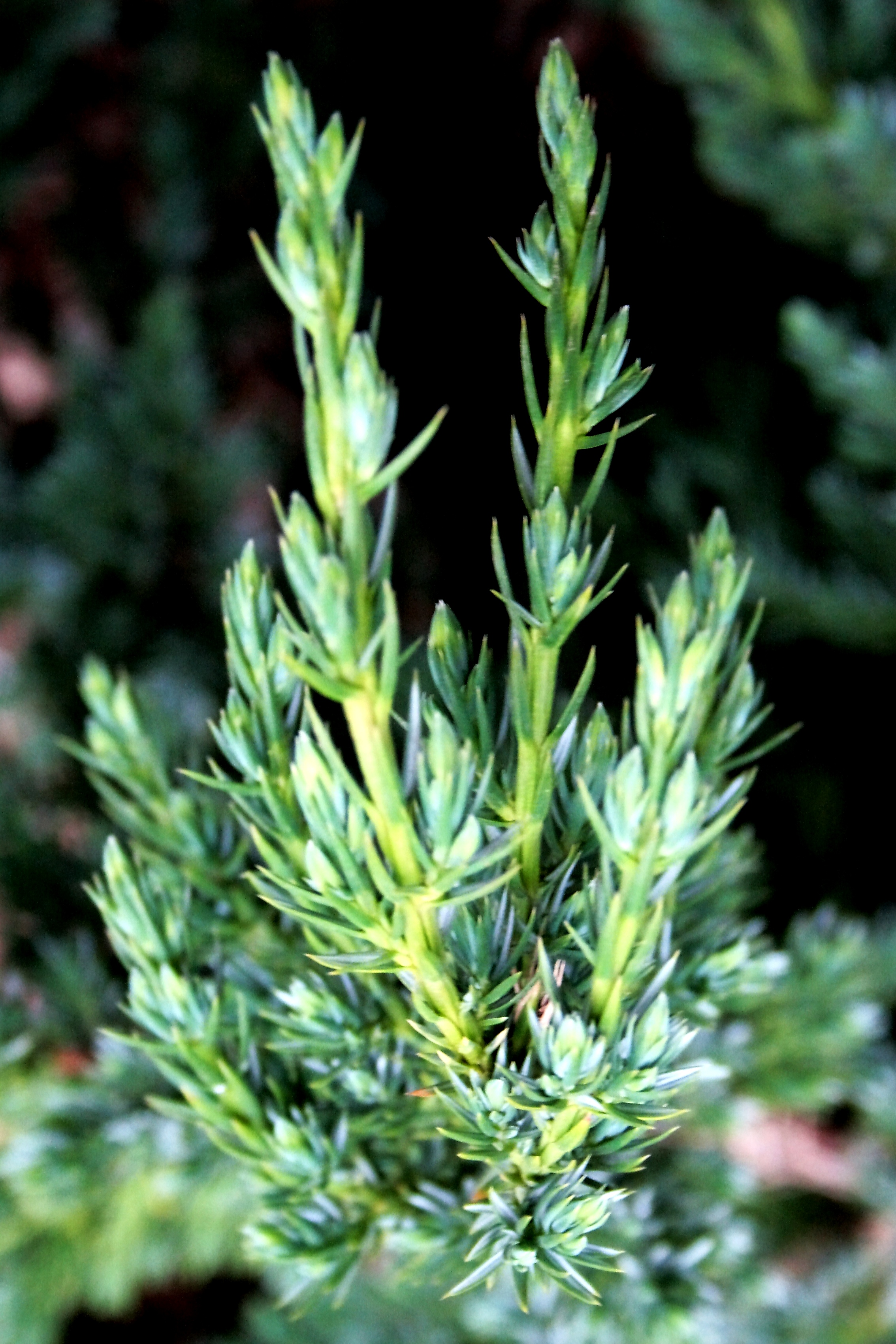 Ísland, Akureyri Botanical Gardens: Beschuppter_Wacholder_(Juniperus_squamata) 'Meyeri'